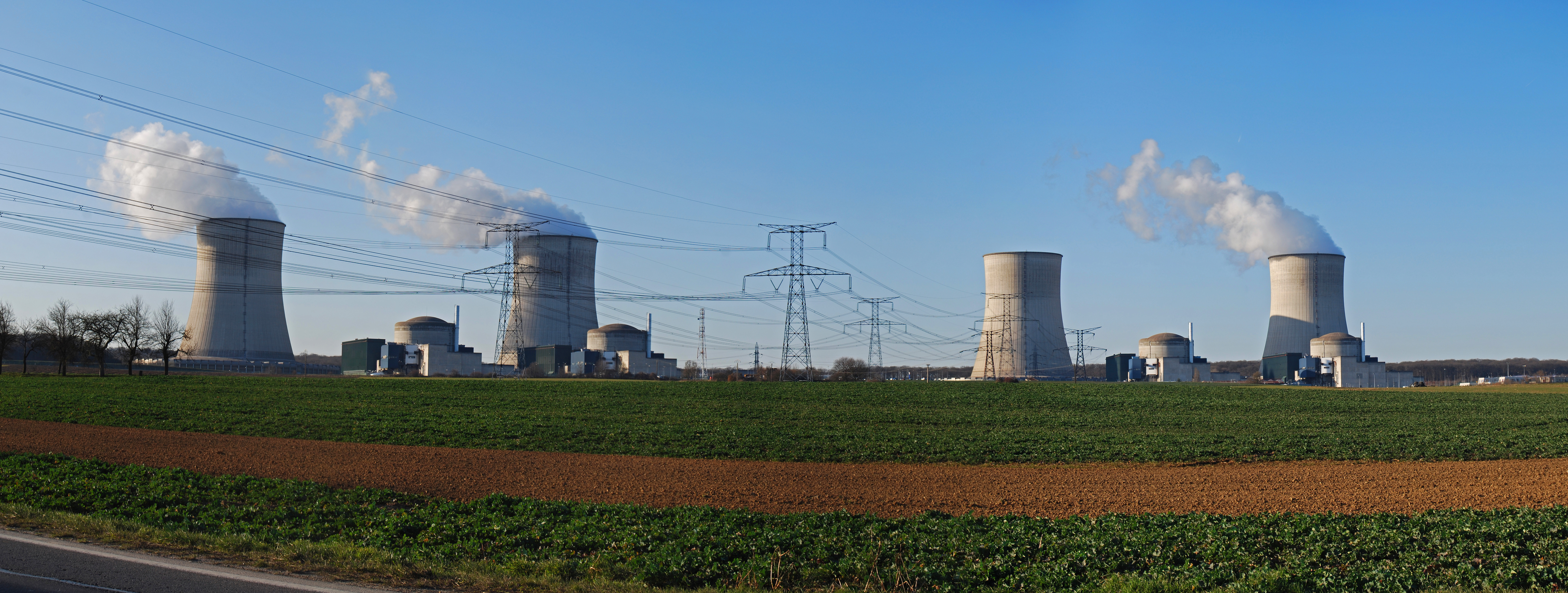 Gesamtaufnahme des Kernkraftwerks Cattenom, Frankreich.